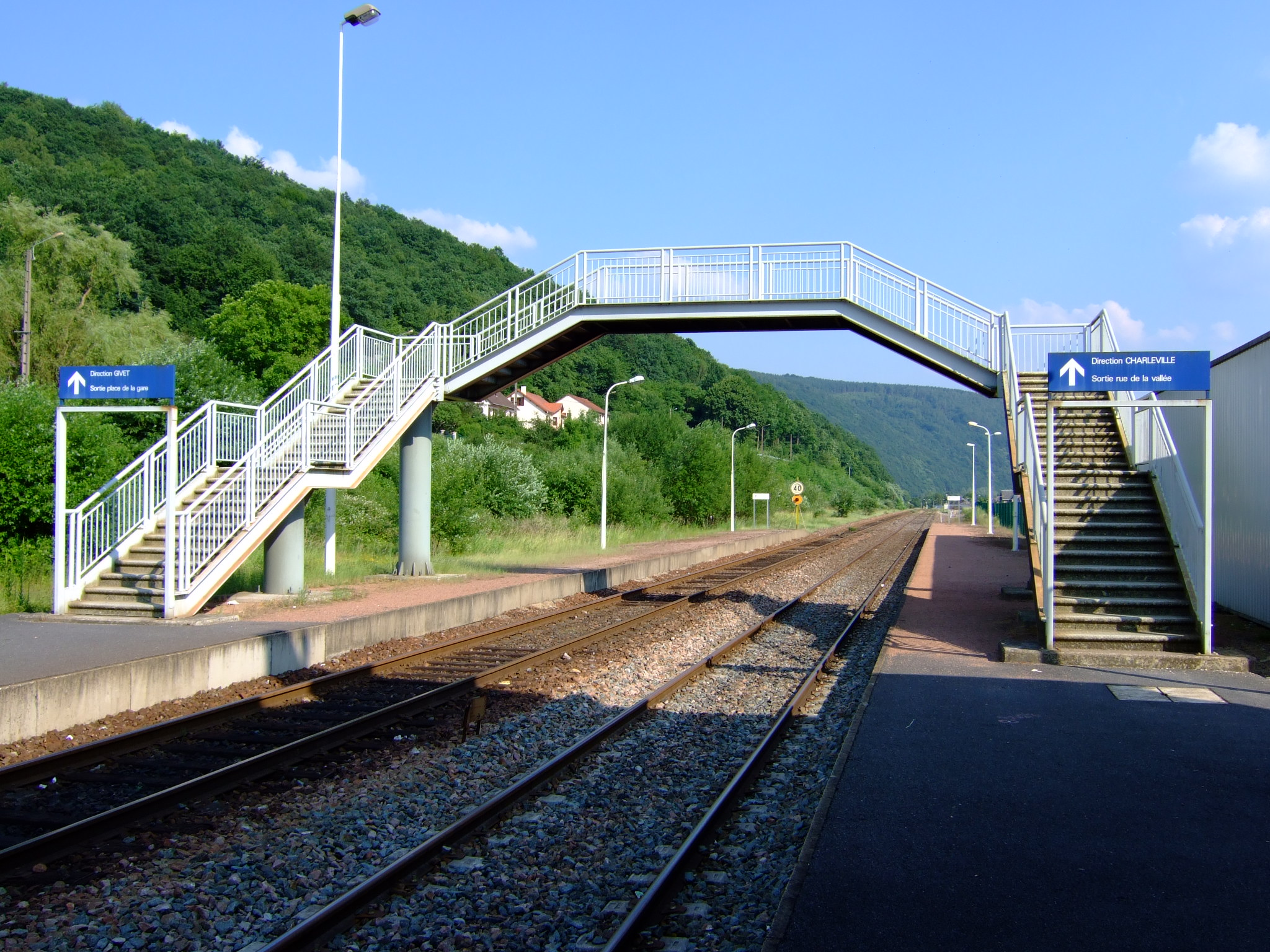 Les quais et le passage surélevé gare de Bogny-sur-Meuse